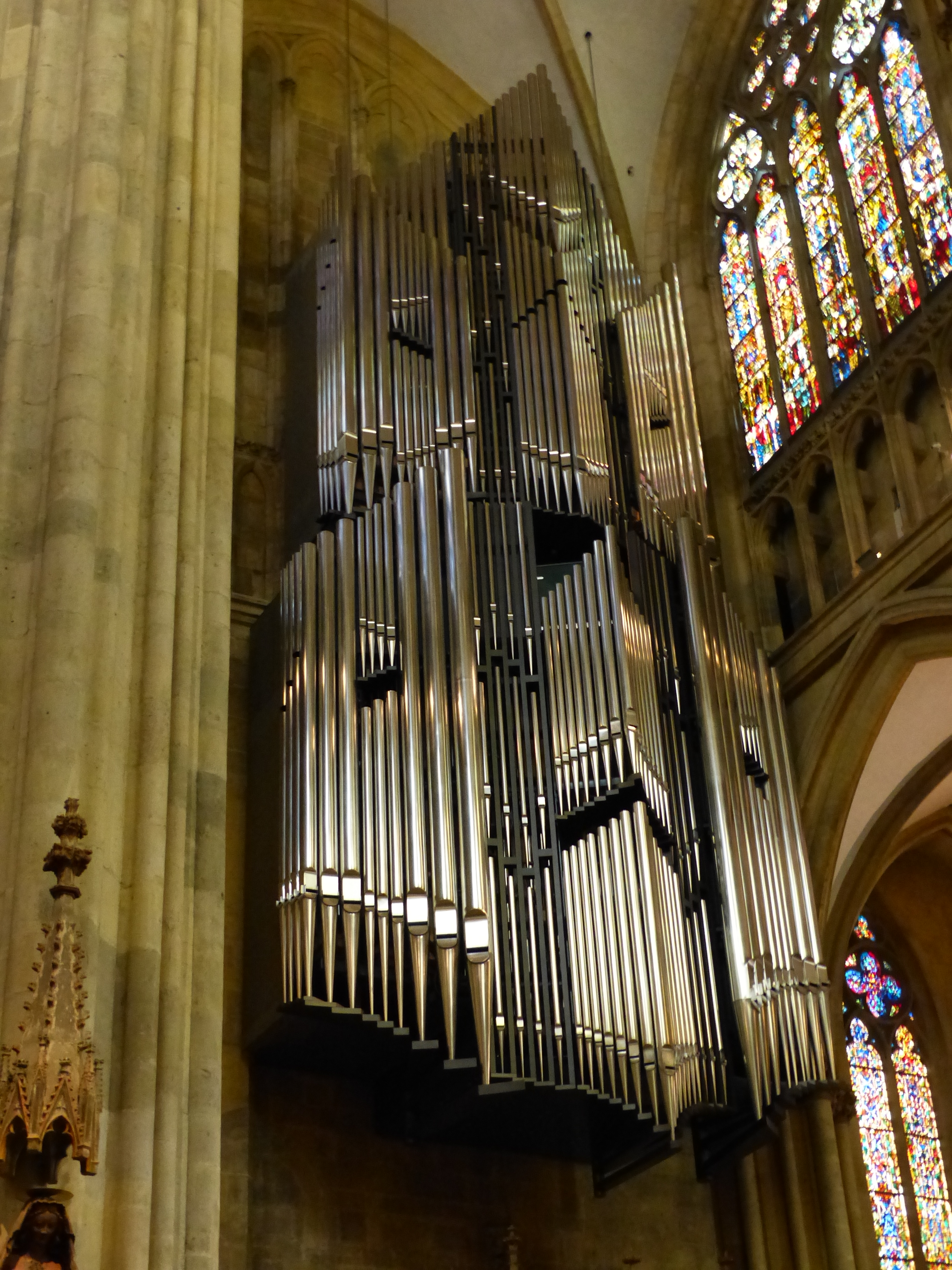 Regensburger DomThis is a photograph of an architectural monument.